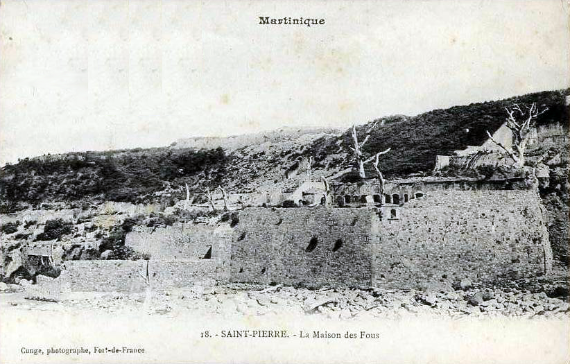 Ruines de la maison coloniale de santé à Saint-Pierre (Martinique) après la catastrophe du 8 mai 1902.